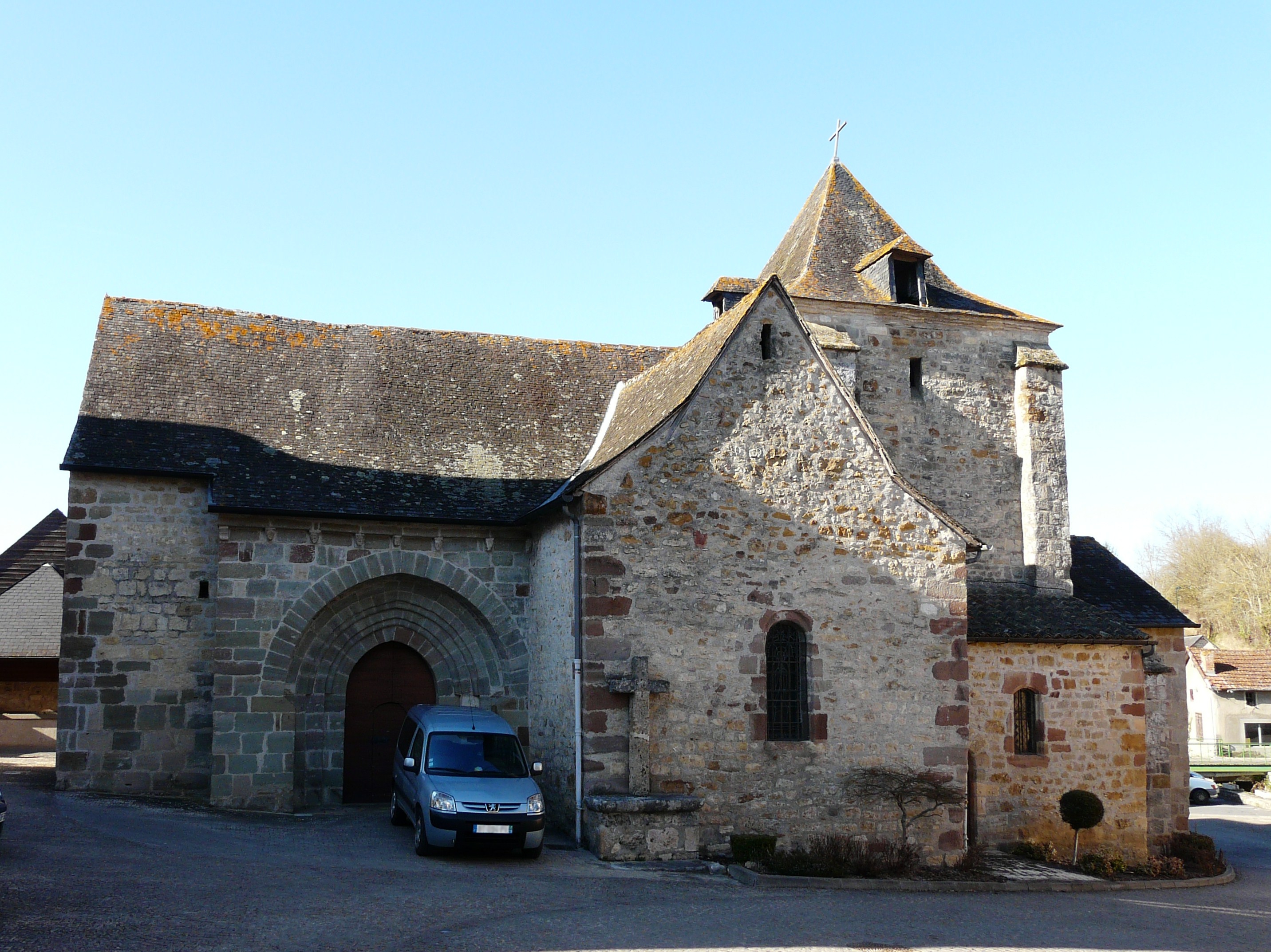 Le côté sud de l'église Saint-Saturnin, Saint-Cernin-de-Larche, Corrèze, France.